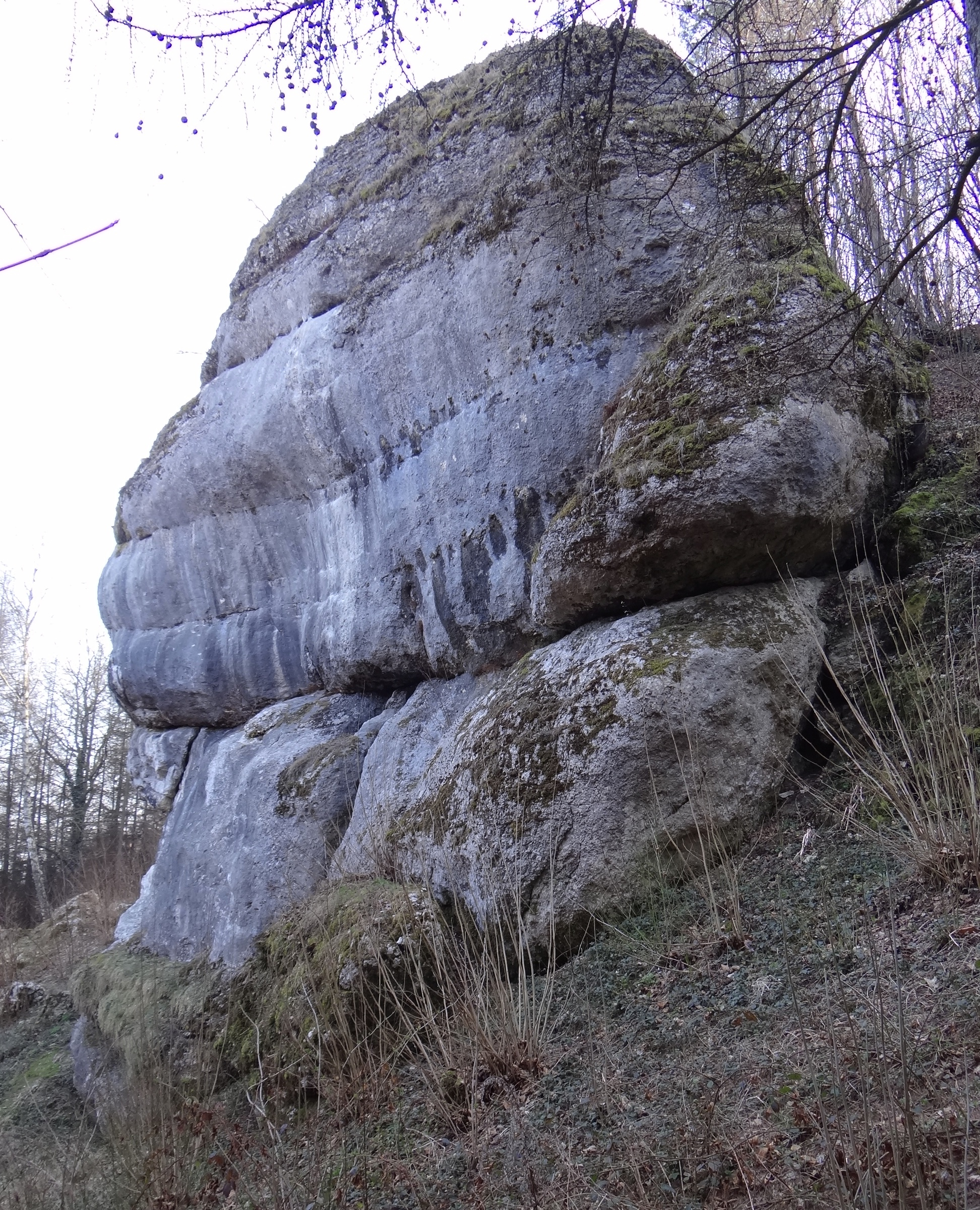 Skała Mysiura w Dolinie Brzoskwinki